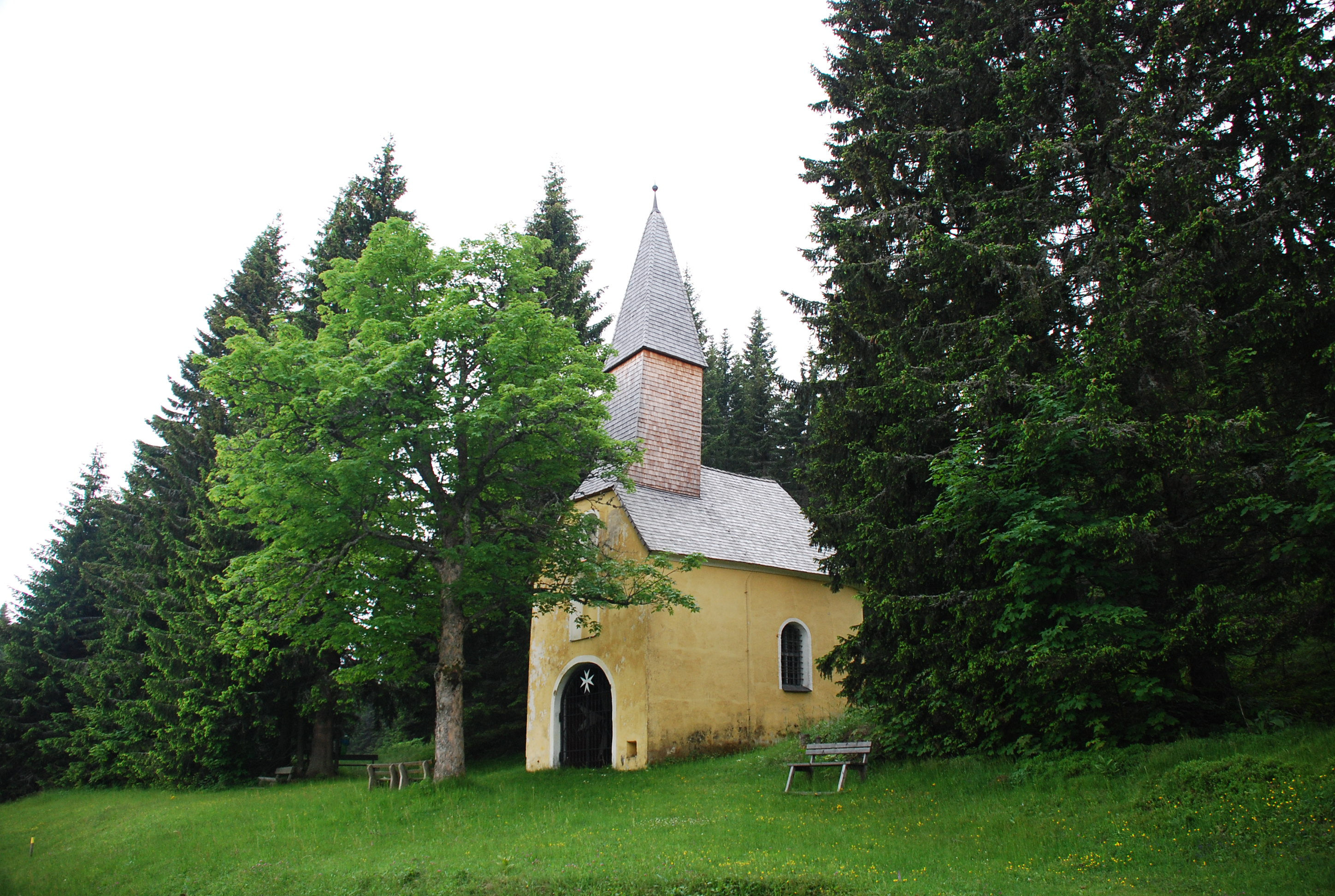 Hubertuskapelle auf der Hebalm